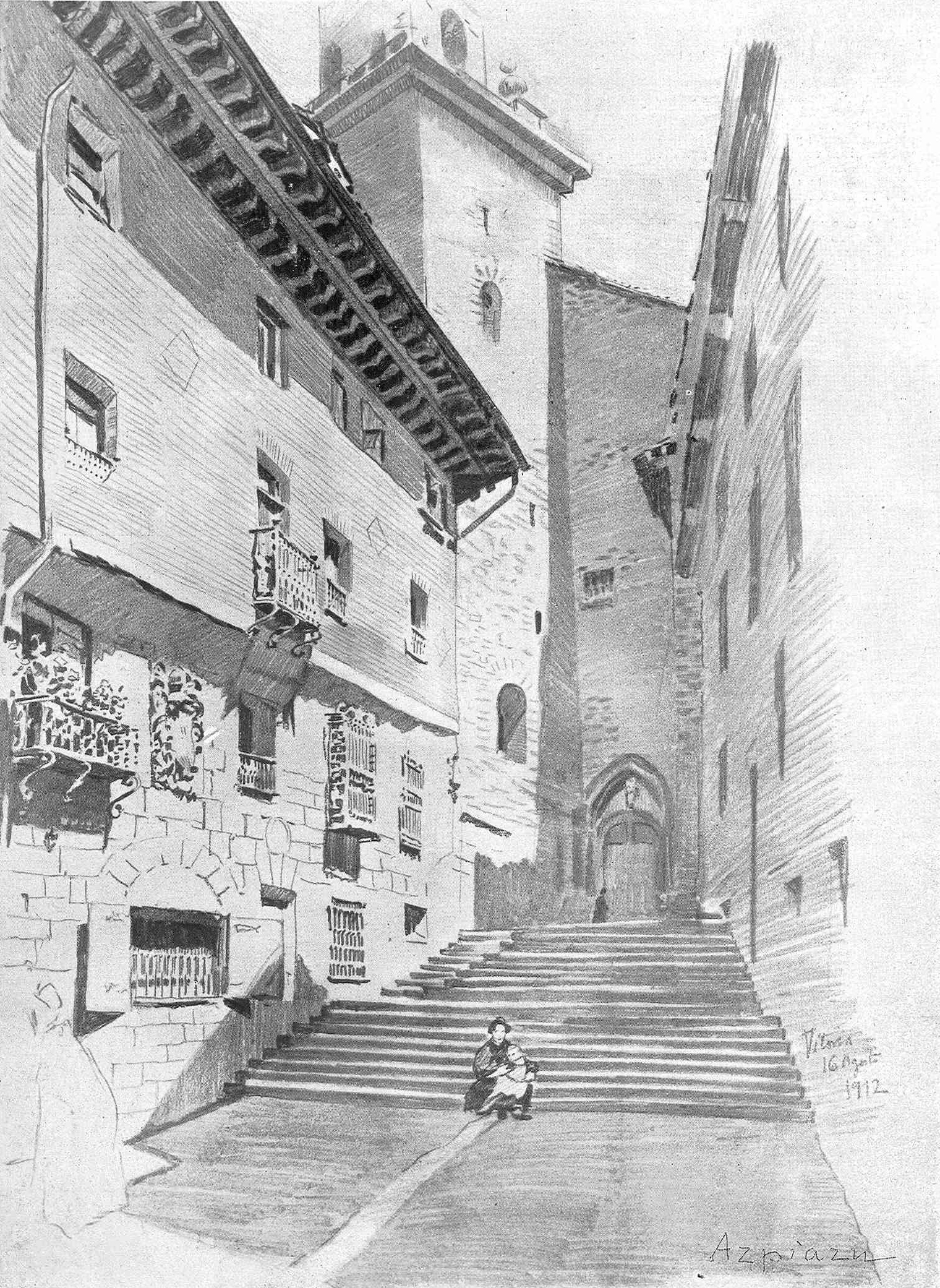 De la vieja España. Una calle de Vitoria.